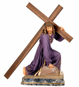 Jesús Nazareno